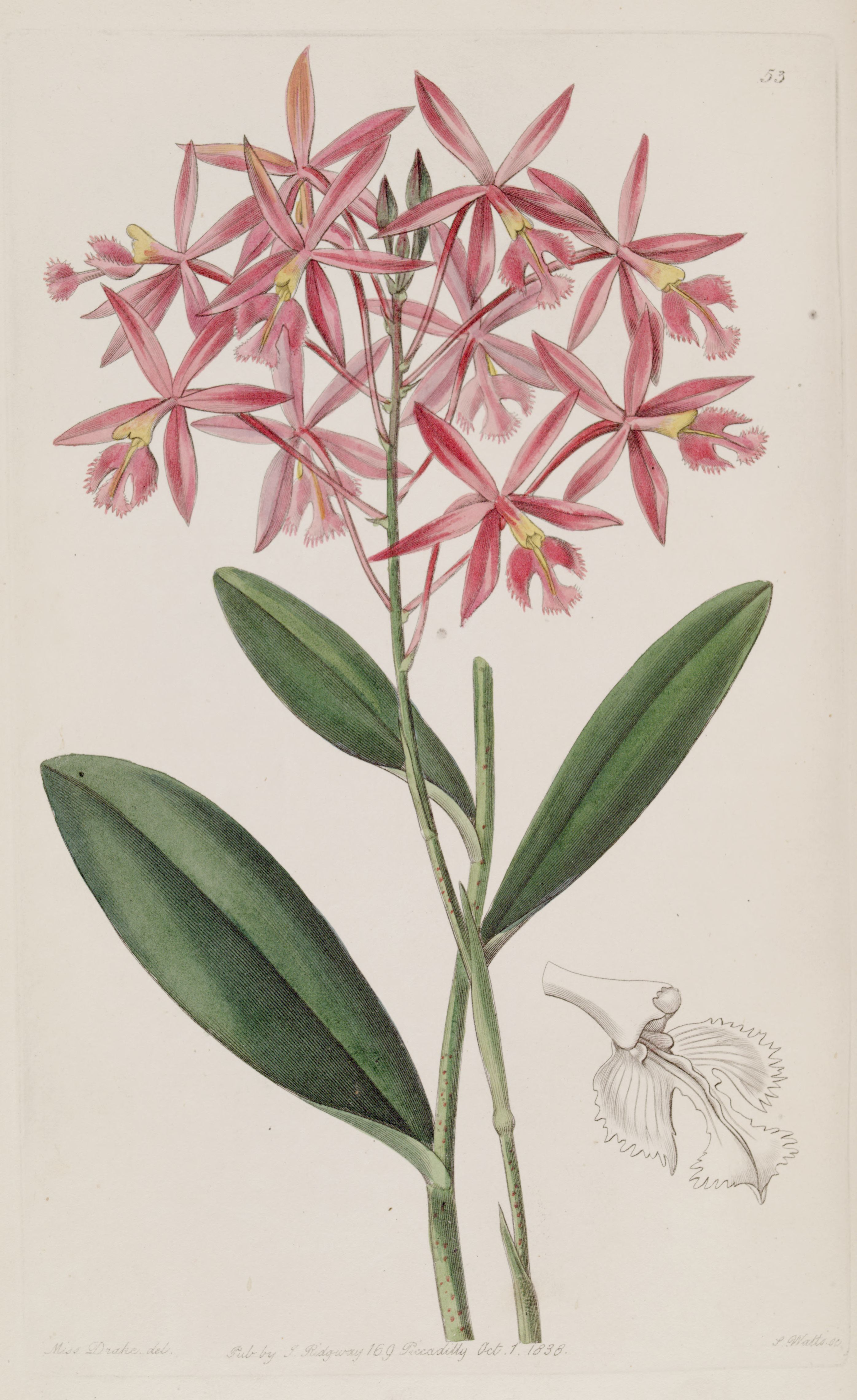 Epidendrum macrocarpum (as syn. Epidendrum schomburgkii)